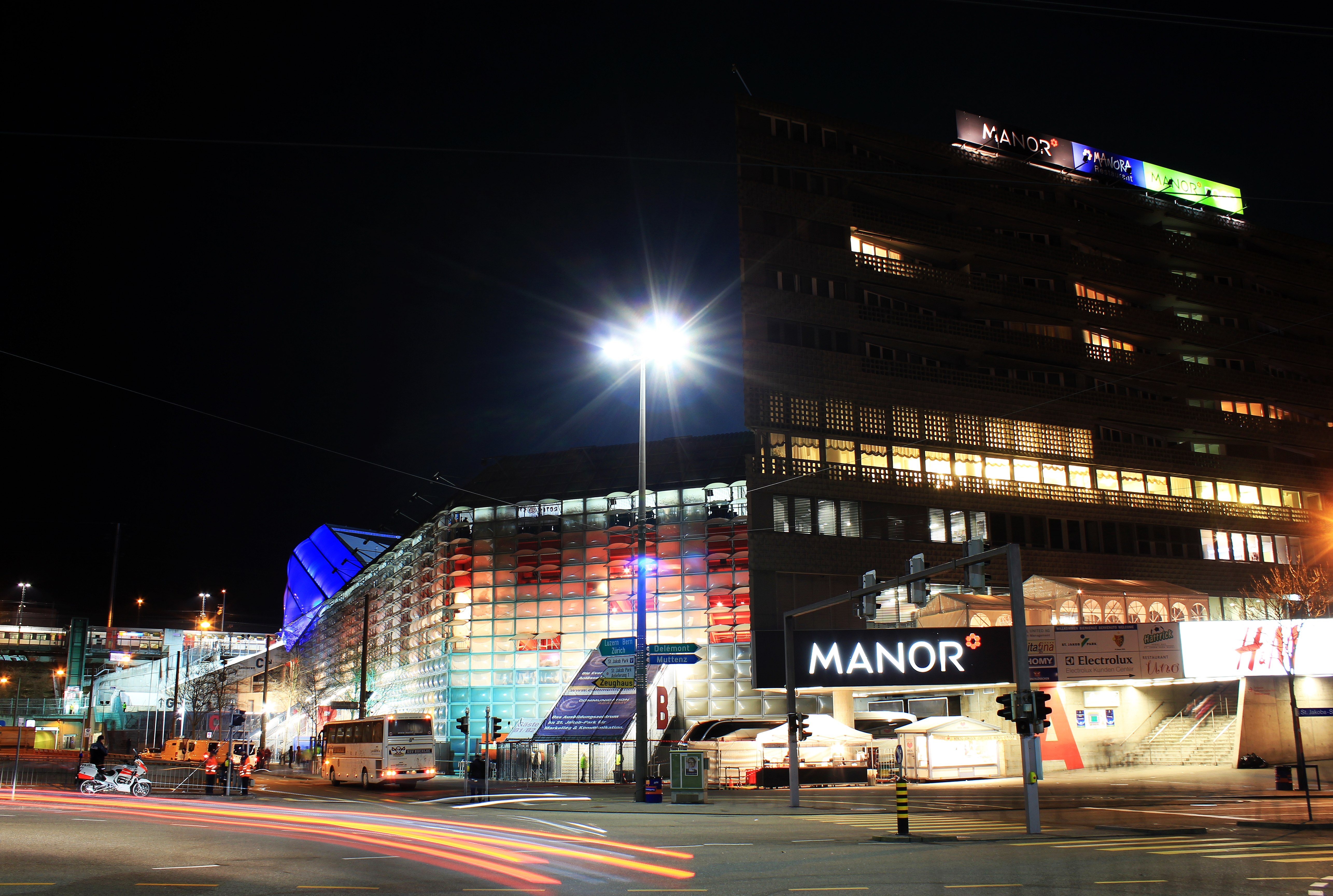 Basel, St. Jakob-Park.